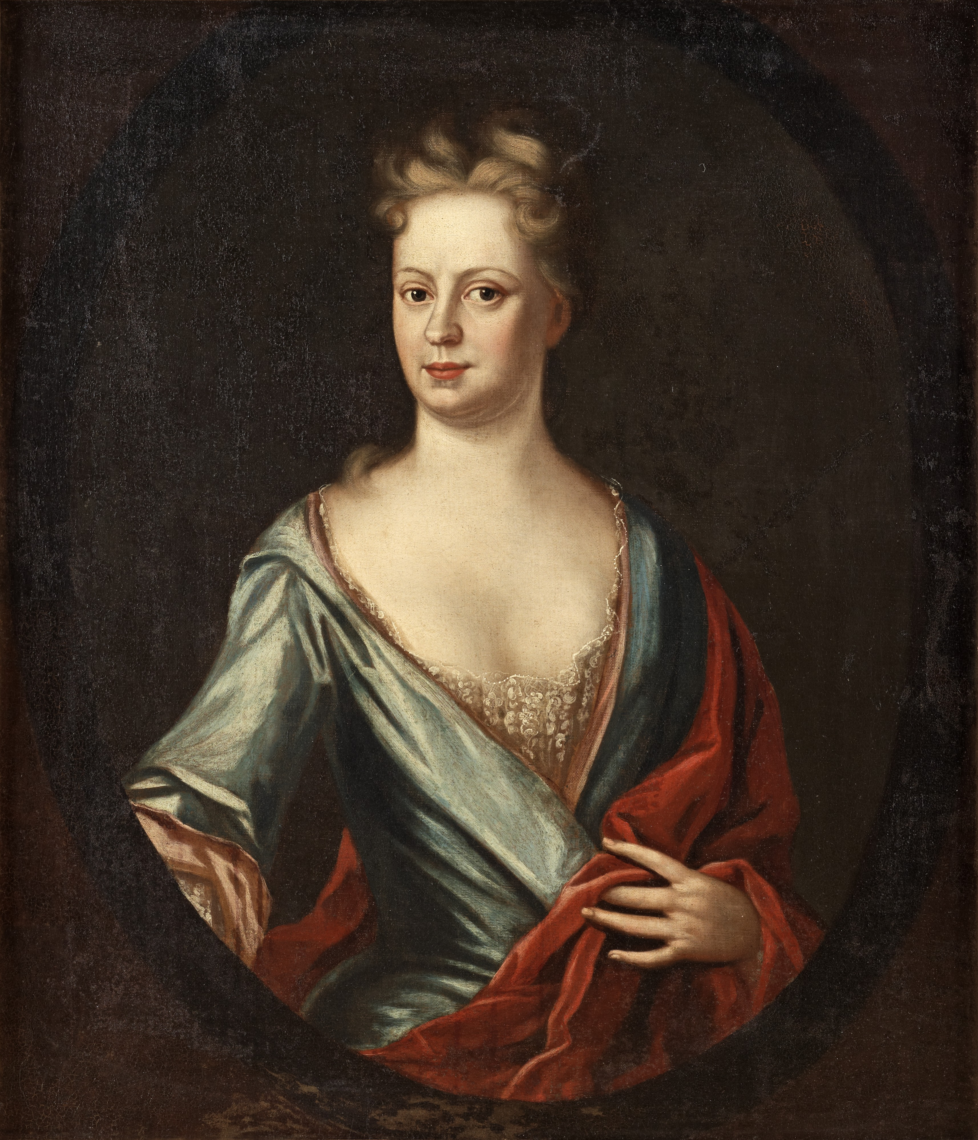 Eva Magdalena Oxenstierna af Korsholm och Wasa. Dotter till diplomaten greve Bengt Gabrielsson Oxenstierna och grevinnan Magdalena Stenbock, och gift med fältmarskalken Magnus Stenbock.